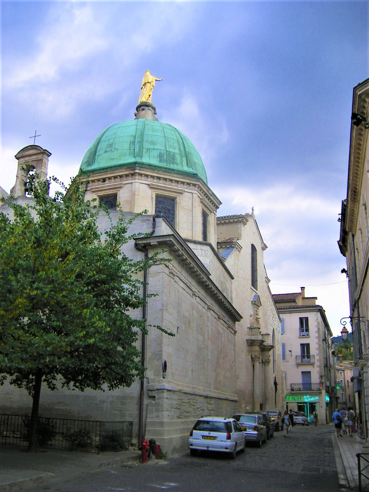 Cathédrale Sainte-Anne d'Apt